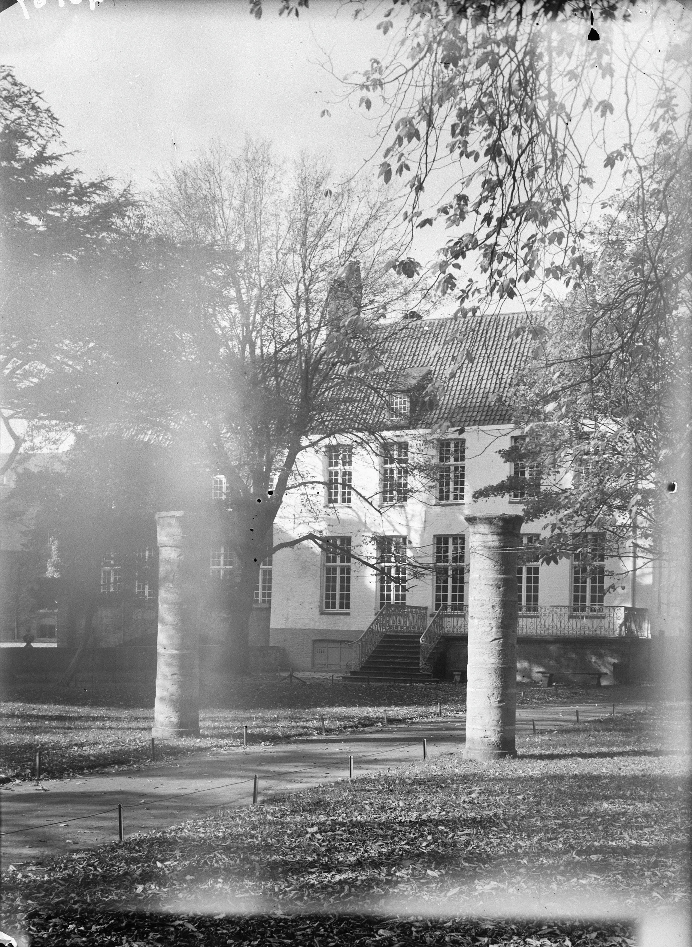 Brangwyn Museum: Zicht op museum